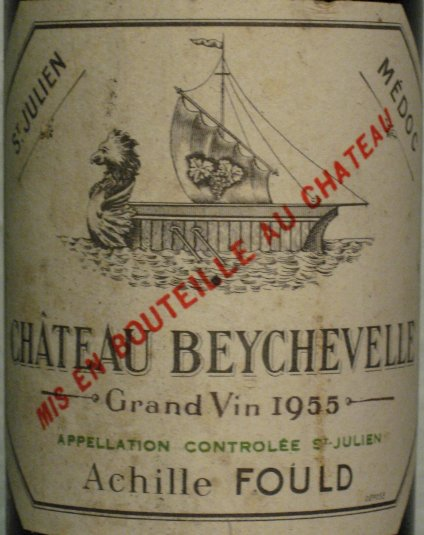 Château Beychevelle 1955 label